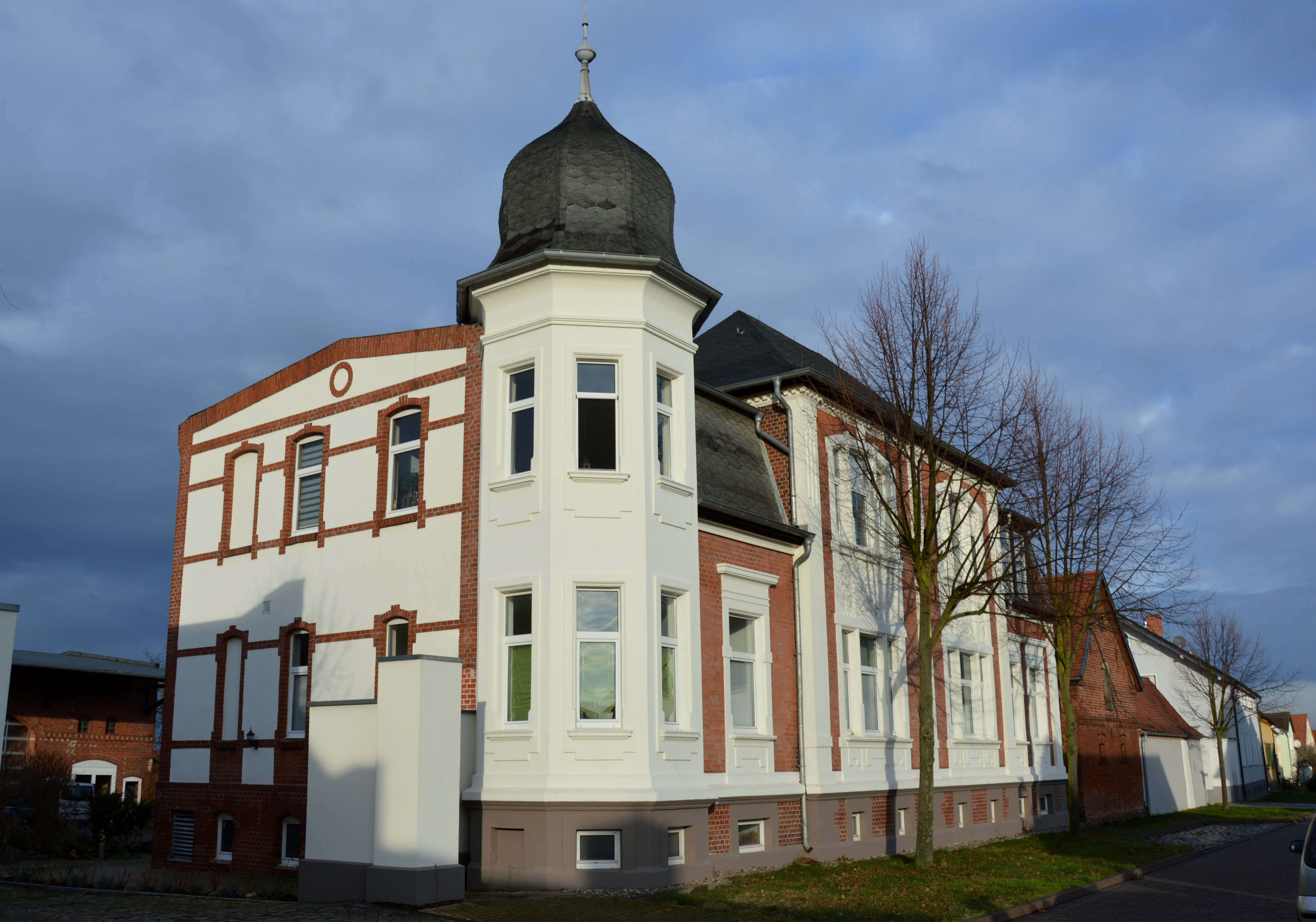 Haus Breite Straße 44 in Glindenberg